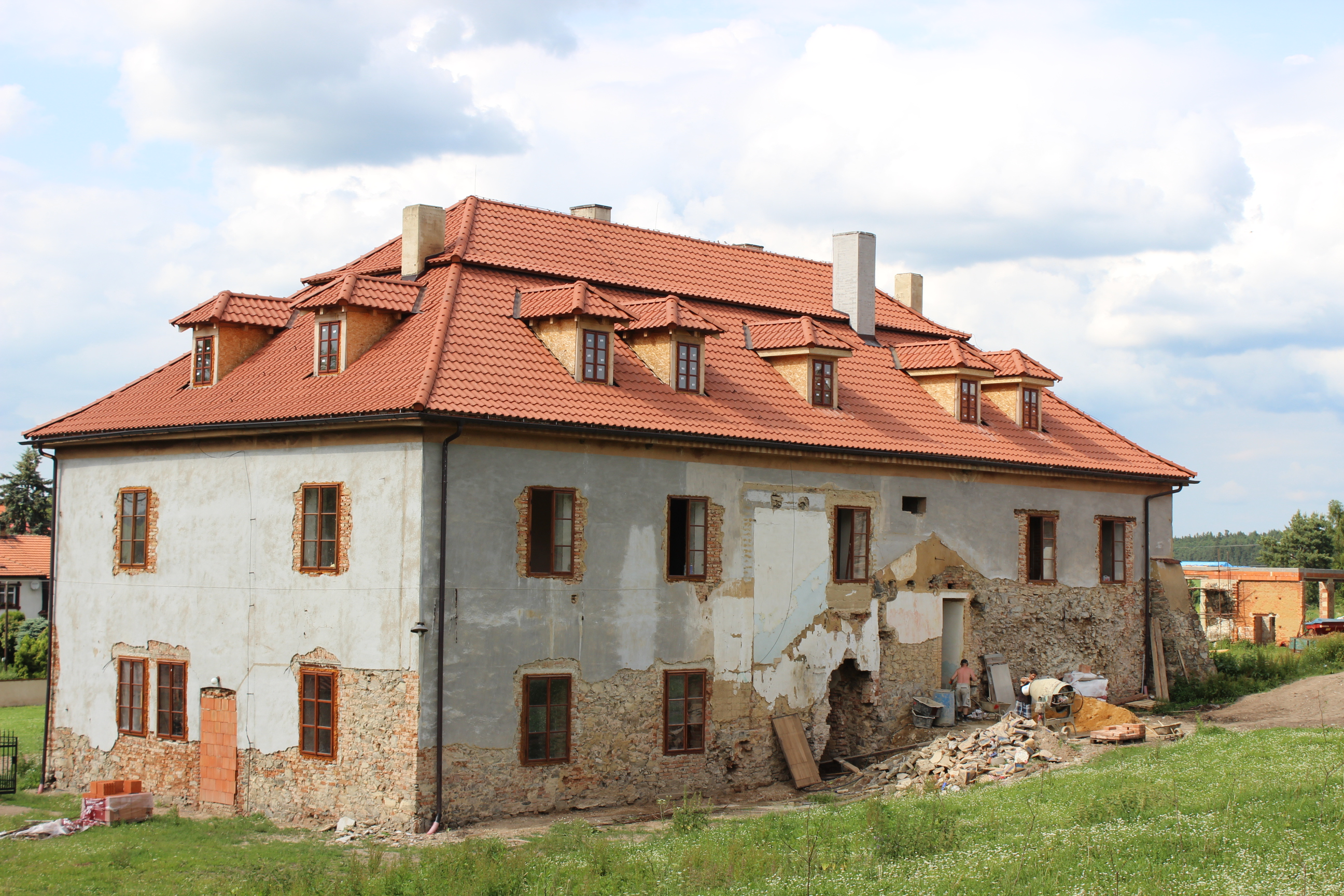 Zámeček ve Skřivani.